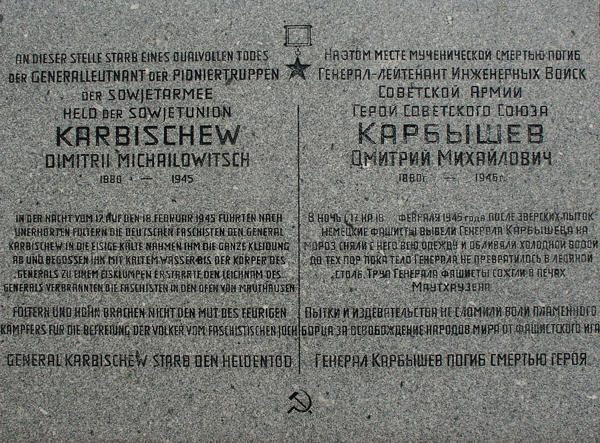 Gedenktafel Generalleutnant Dimitrii Michailowitsch Karbischew, Gedenkstätte KZ Mauthausen